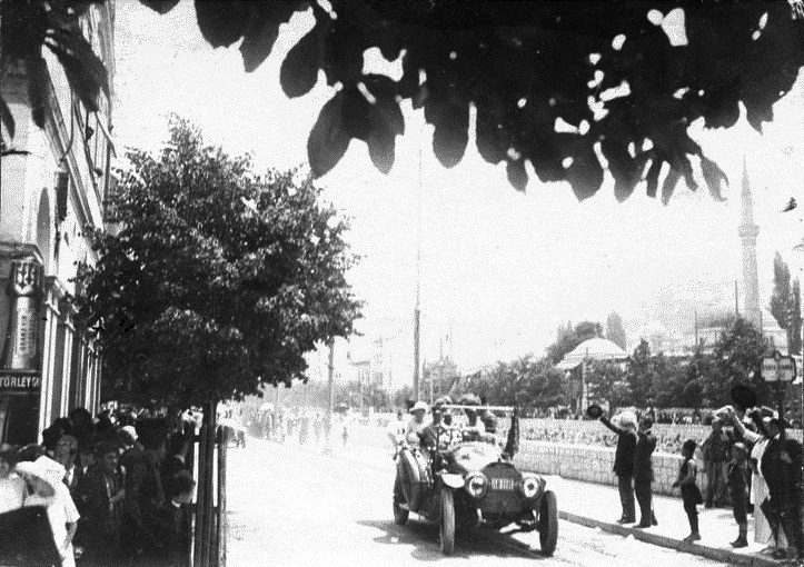 El archiduque Francisco Fernando y su esposa Sofía Chotek a su paso por la ciudad de Sarajevo.